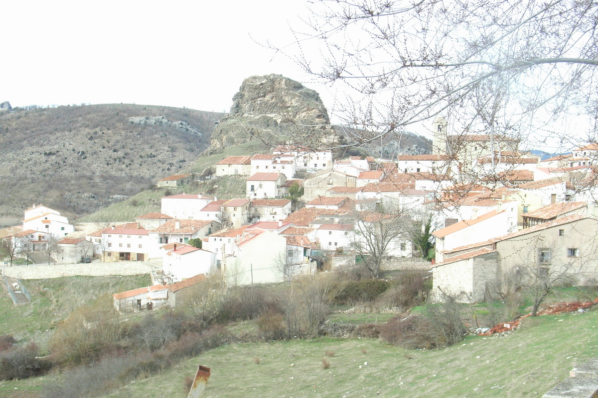 Vista de la localidad de Huélamo (Cuenca)